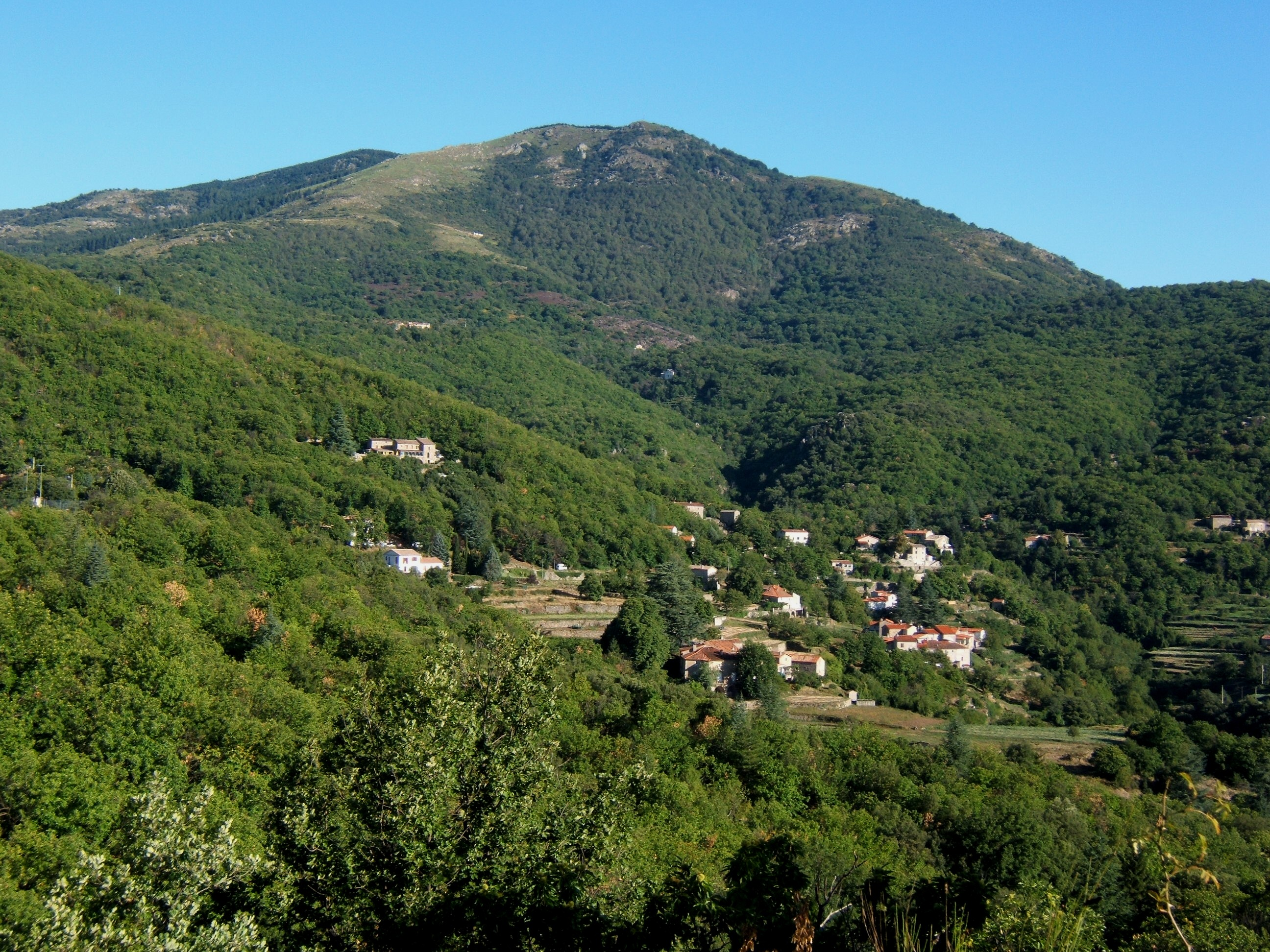 Les pentes de la Toureille (1240m)